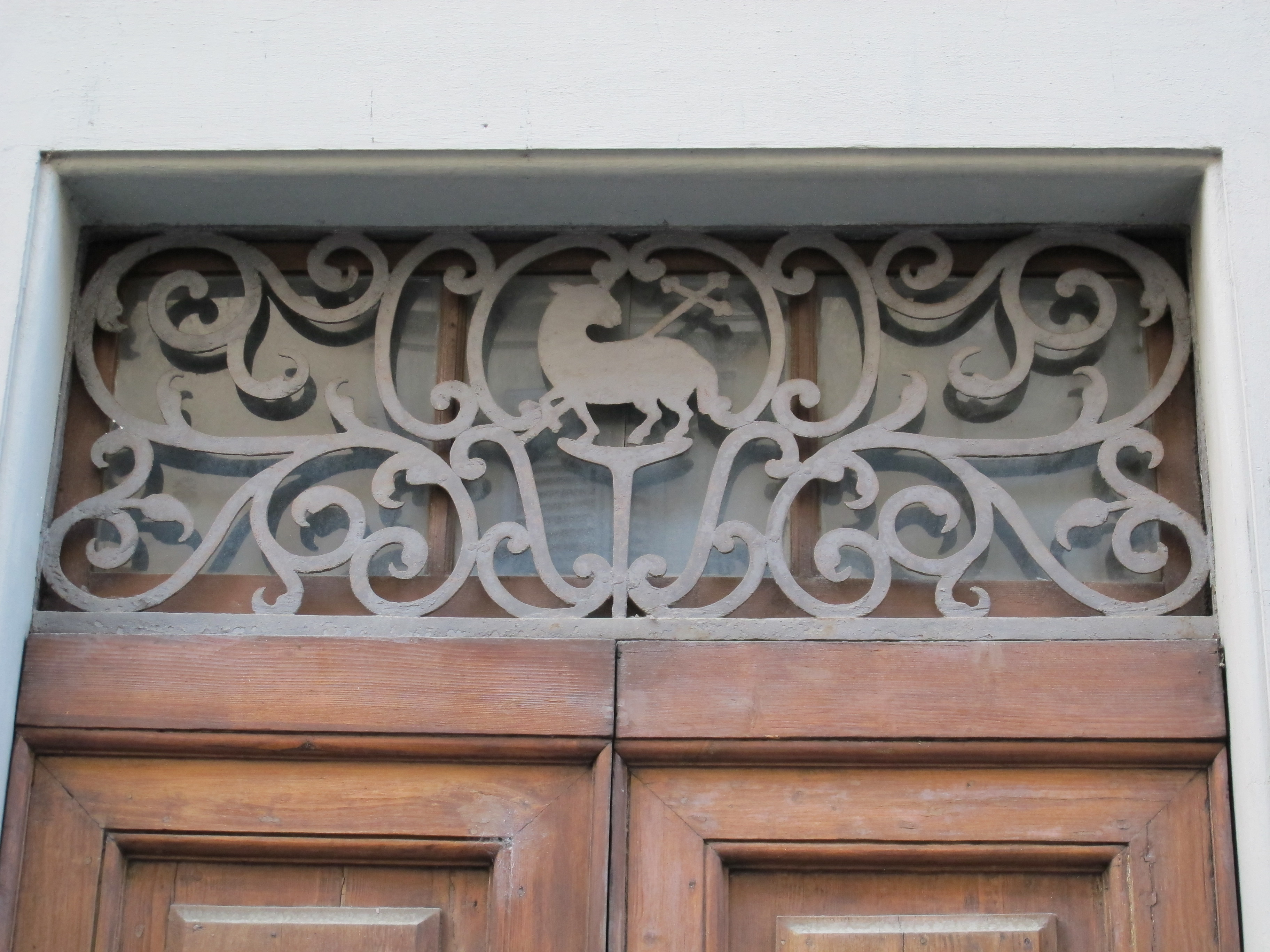 Ospedale degli incurabili